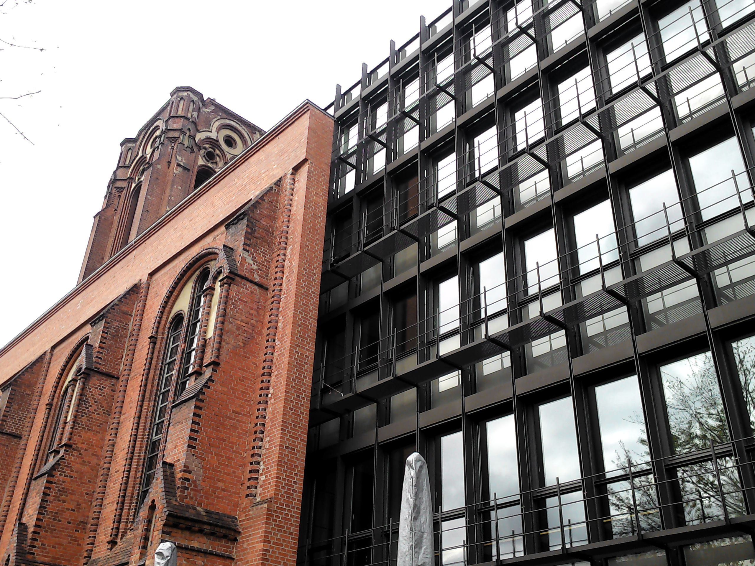 Auferstehungskirche des Kirchenkreises Berlin Stadtmitte in Berlin-Friedrichshain, Germany. Bau- und Kulturdenkmal mit modernem Einbau.